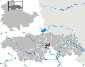 Seega in Thuringia - Kyffhäuserkreis